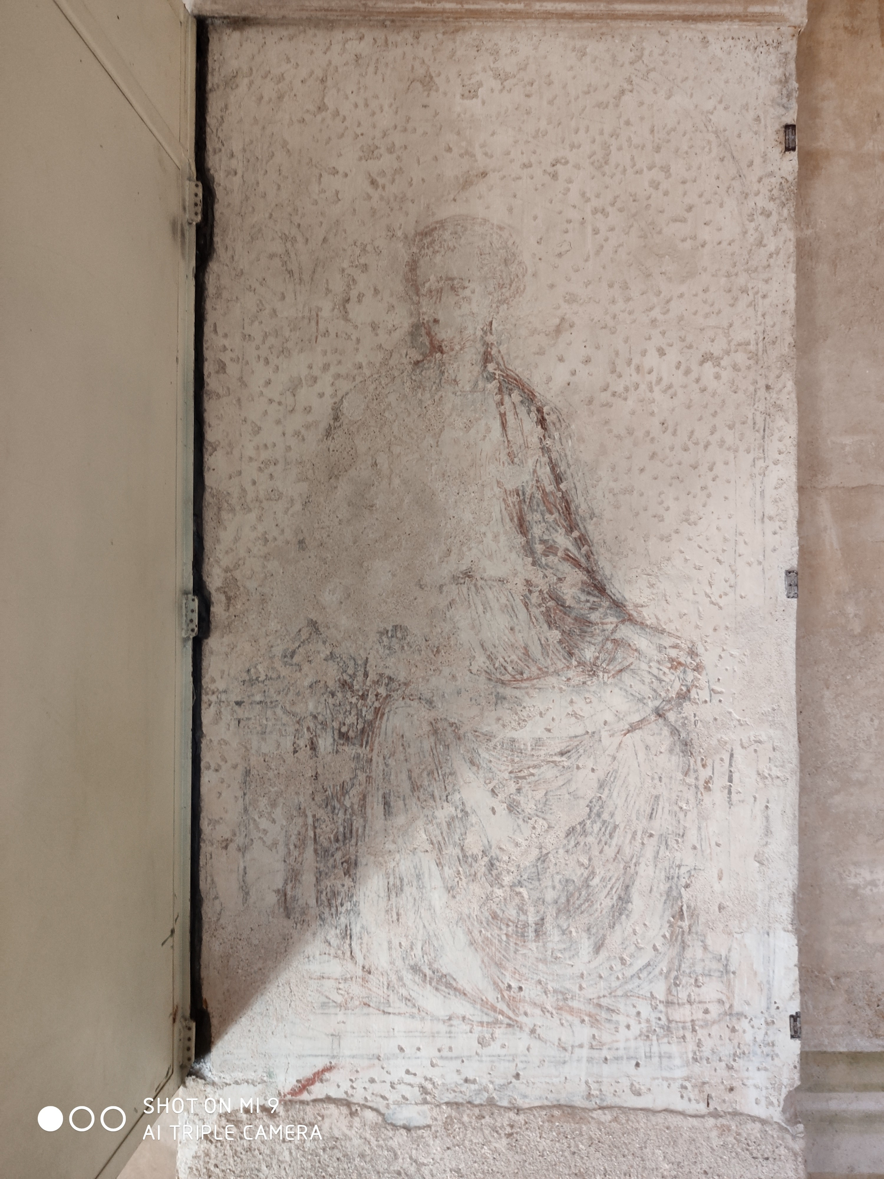 l'affresco staccato e riportato su pannello rimovibile alla cui apertura mostra la sottostante sinopia rimasta sull'arriccio